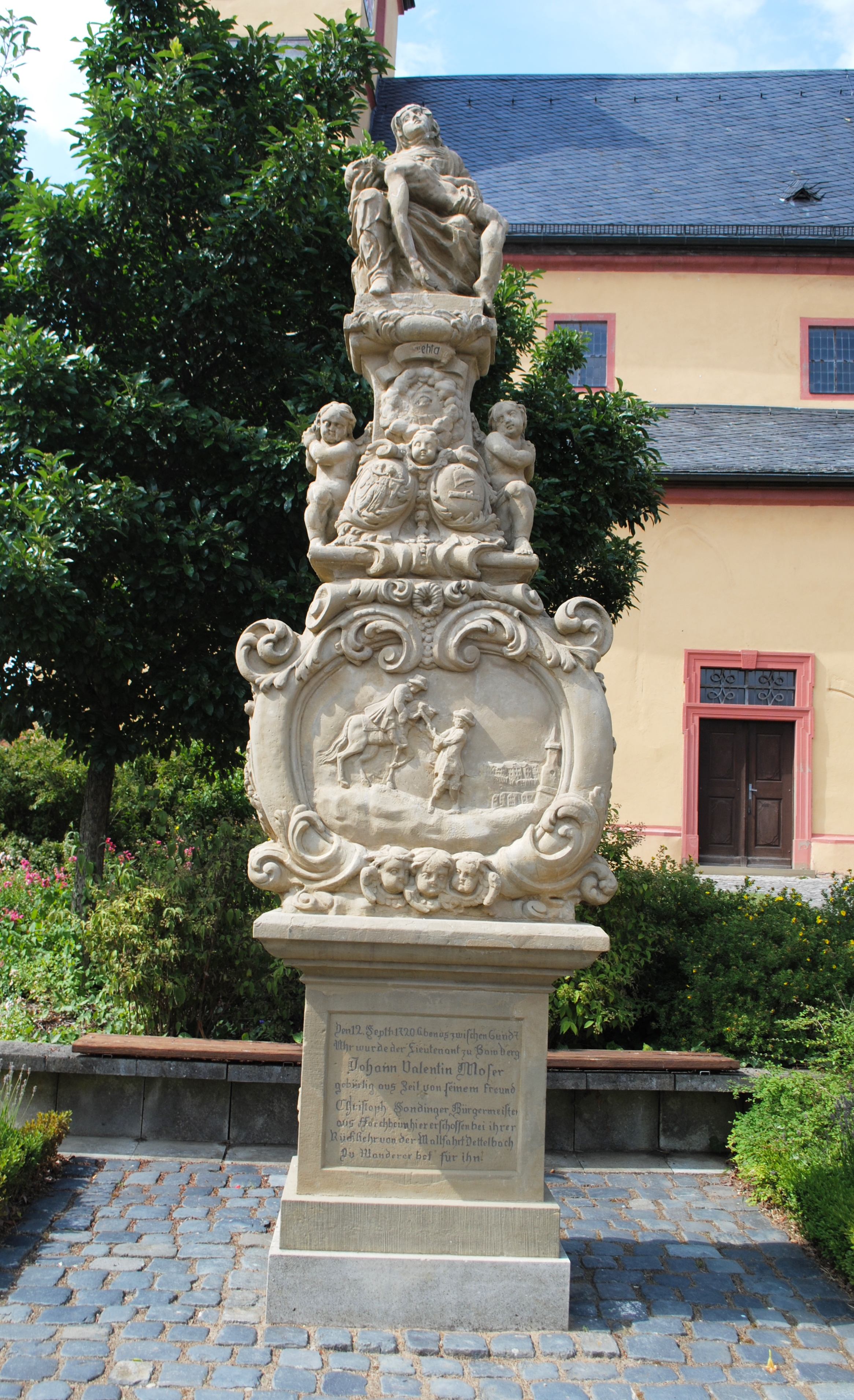 Mordbildstock, Volkach-Dimbach, Kirchplatz